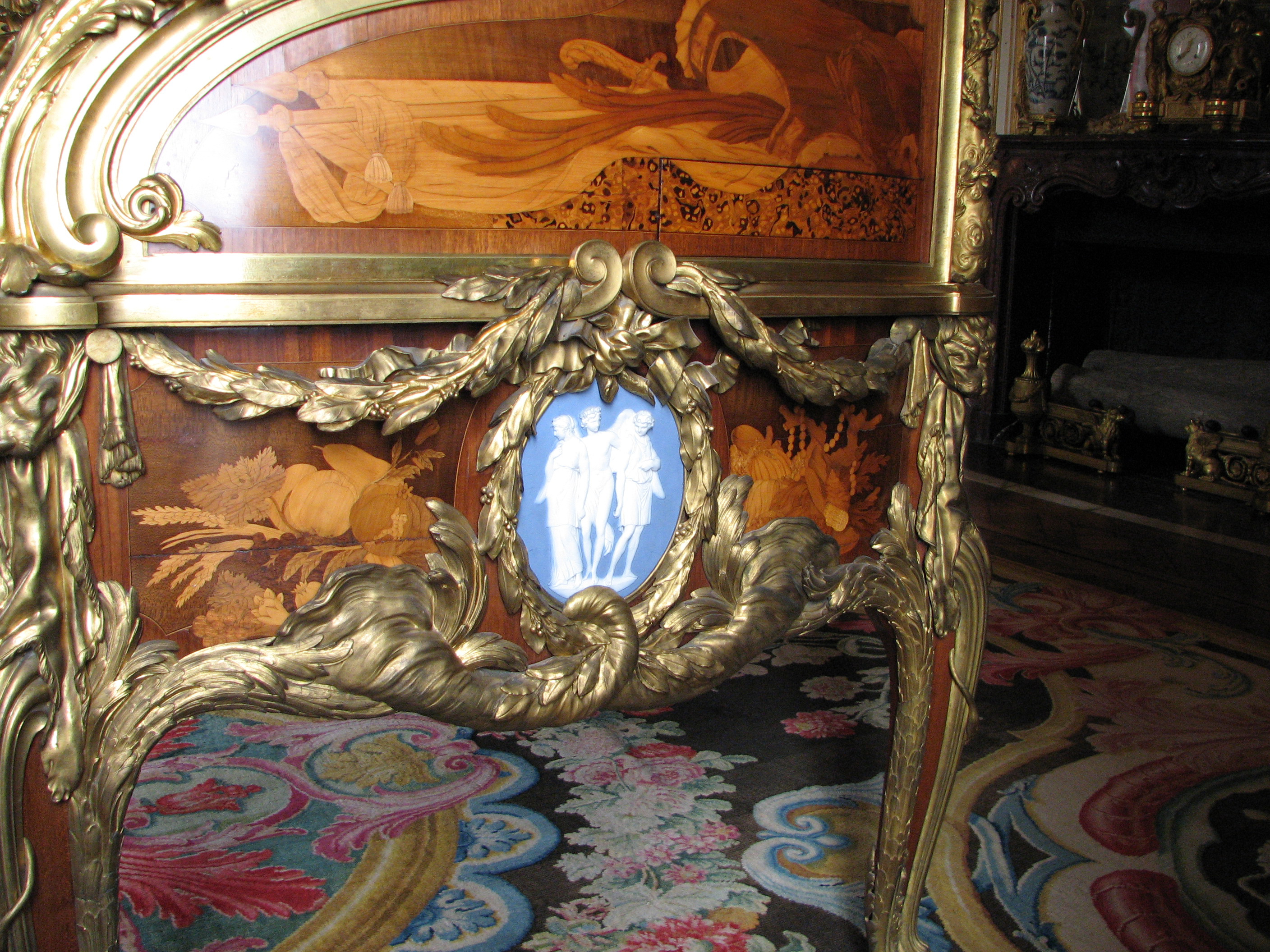 Bureau du Roi ou secrétaire à cylindre de Louis XV, cabinet intérieur du Roi - coté droit, détail du médaillon